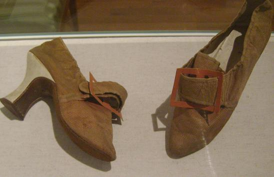 Kinderschuhe der Prinzessin Therese von Sachsen-Hildburghausen die von ihr bei einer Aufführung des "Rotkäppchens" im Hildburghäuser Theater getragen wurden, um 1800, Stadtmuseum Hildburghausen